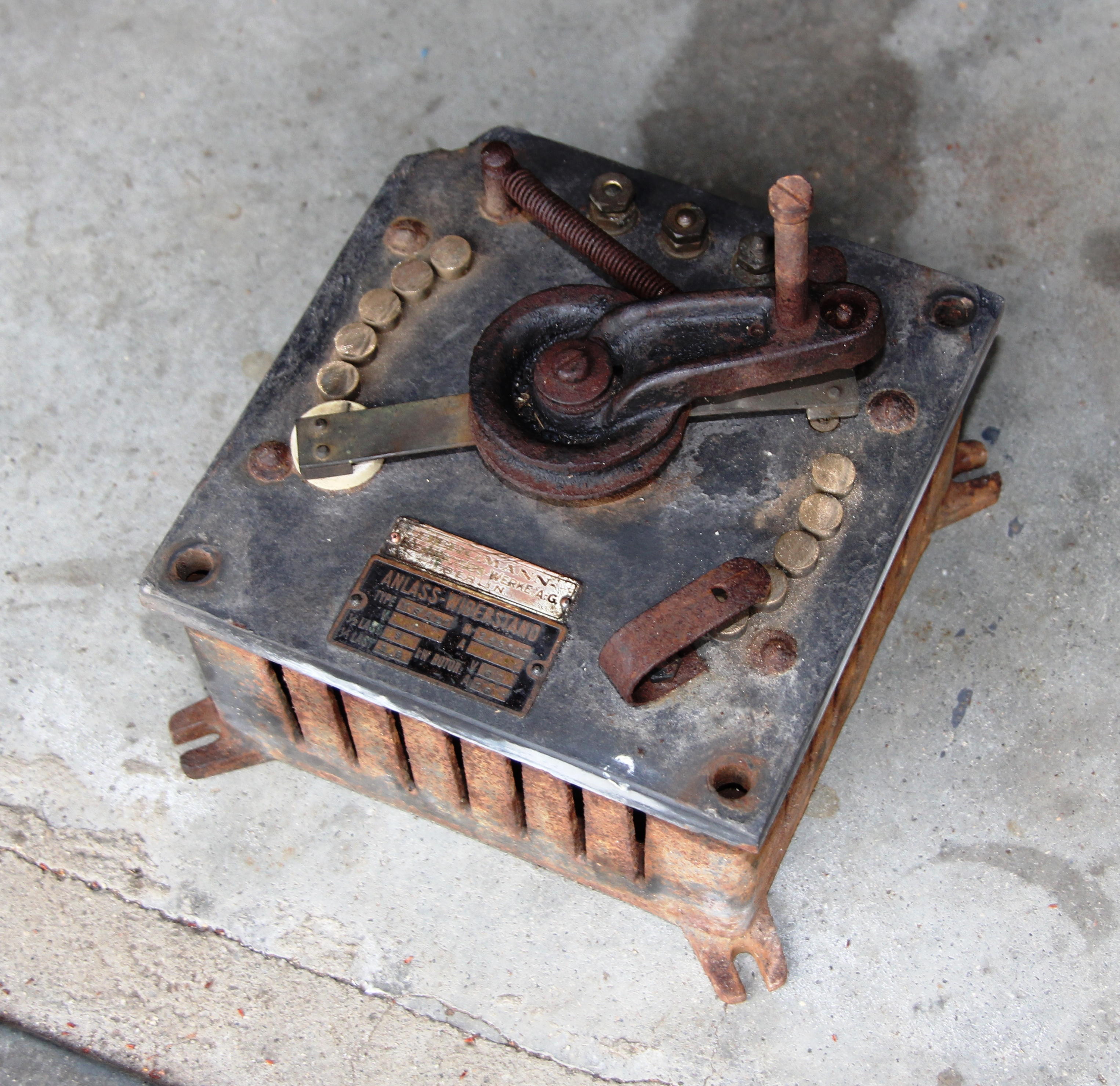 Defekter Anlasswiderstand für Schleifringläufermotoren bis 1,5kW von Bergmann Berlin (später Bergmann Borsig), etwa 1920er-Jahre. Holzgriff und einige Kleinteile sowie eine Abdeckung fehlen. Gut zu erkennen. Die Messingschleifkontakte des Stufenschalters.